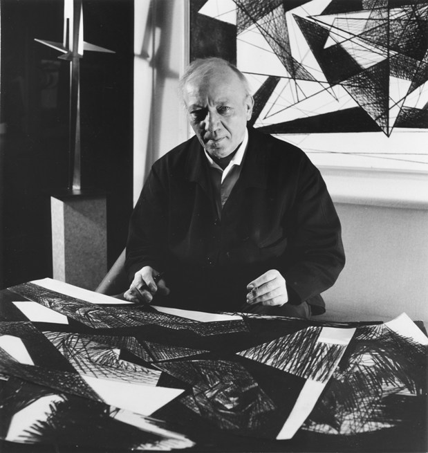 Hans Uhlmann (Künstler, 1900-1975) signiert seine Zeichnungen. Um 1970. Künstlerporträt. Foto: Fritz Eschen